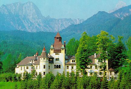 Schloss Kassegg, typische Ansicht aus den späten 80er Jahren